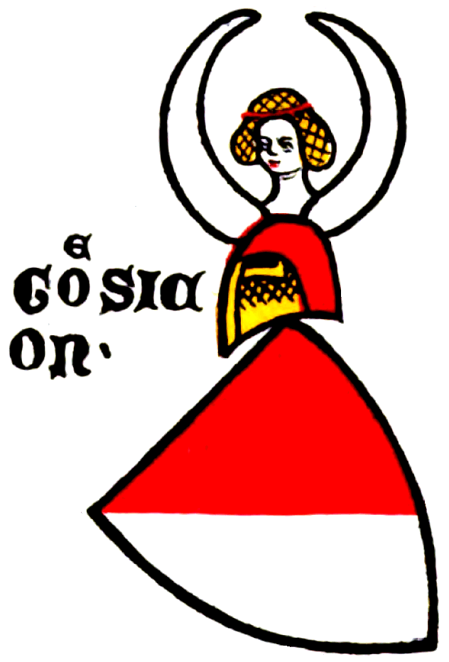 Wappen der Goesicon (Gösgen)